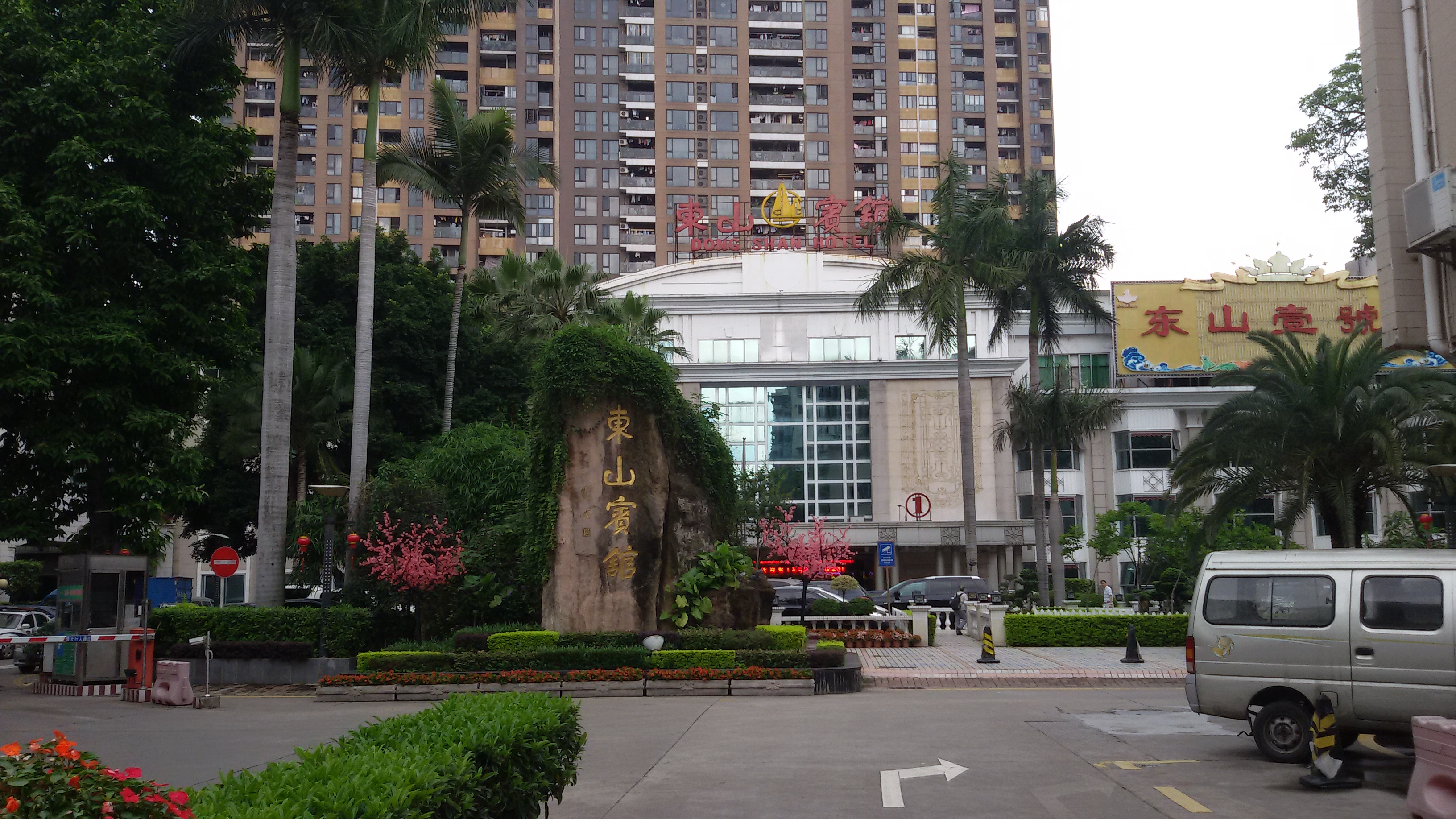 粵語: 廣州嘅東山賓館正門